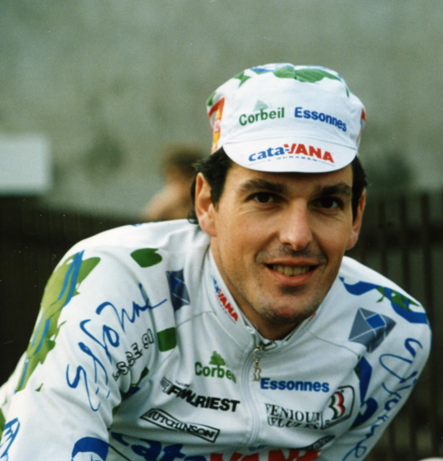 JUBILE PATRICE ESNAULT